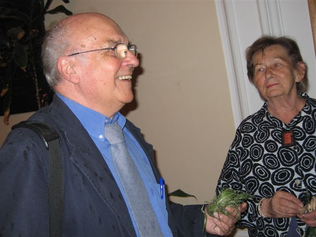 Ryszard Kapuściński (1932-2007), Polish writer and journalist and Urszula Kozioł (b. 1931), Polish poet